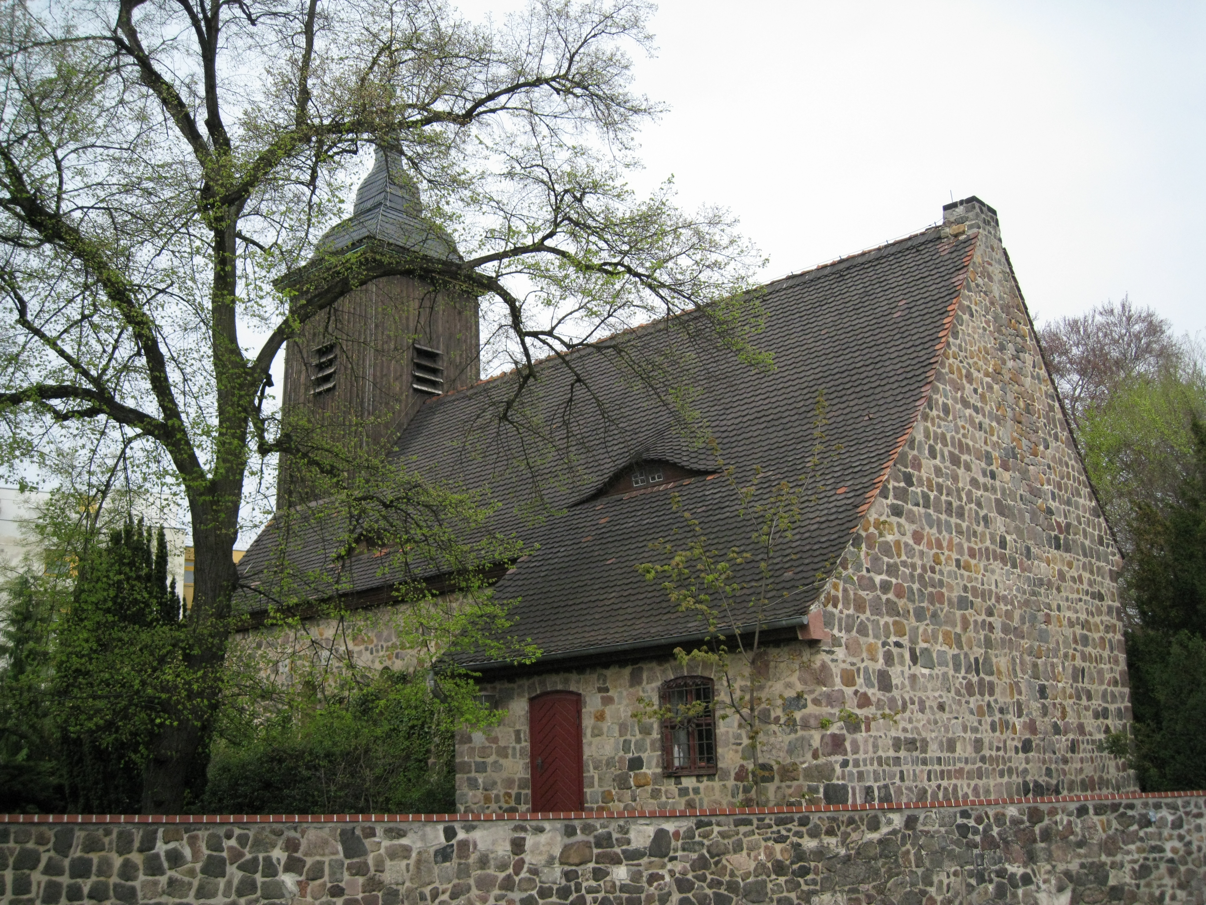 Dorfkirche Lichterfelde, Blick von Südosten auf die Sakristei